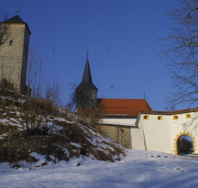 Schloss Aufseß in der Fränkischen Schweiz